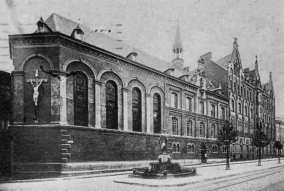 Kloster der Schwestern vom armen Kinde Jesus mit der Kind-Jesu-Kapelle in der Aachener Jakobstraße (vormals Cölestinerinnenkloster)